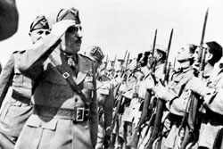 GRUPPO BATTAGLIONI "GIOVANI FASCISTI" (VILLAGGIO GIODA MARZO 1942) I MARESCIALLI D'ITALIA CAVALLERO E BASTICO PASSANO IN RASSEGNA IL GRUPPO BTTGG. GG.FF.